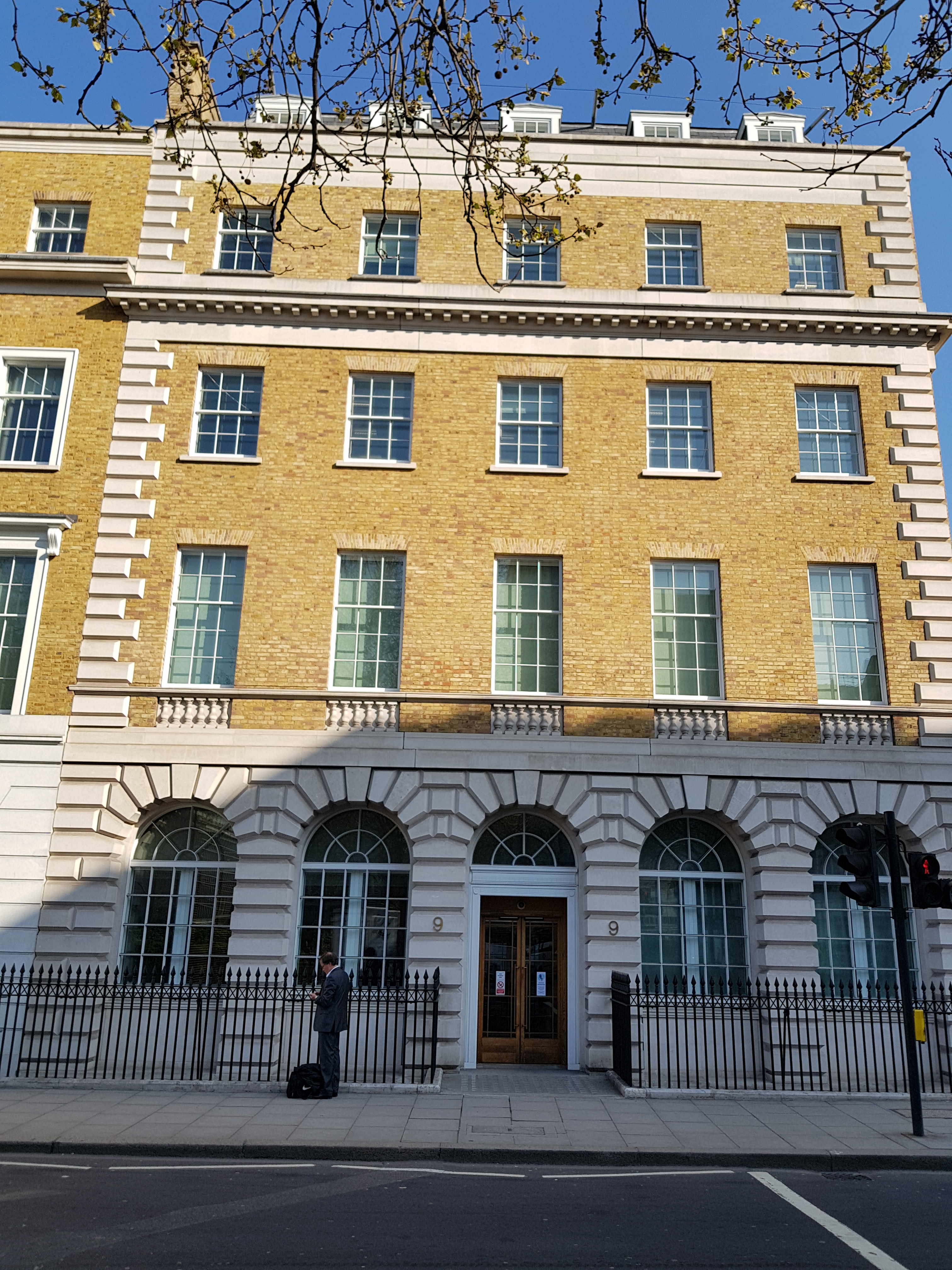 N° 9 Cavendish Square, Londres.